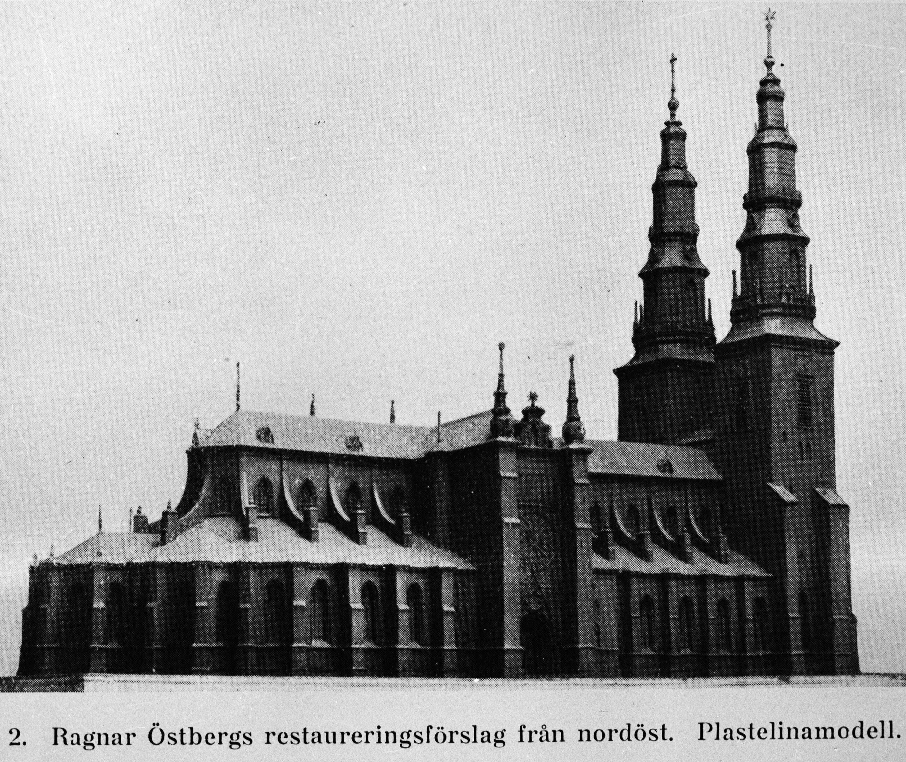 Kyrkan mot nordöst enligt Ragnar Östbergs restaureringsförslag. Plastelinamodell. Kategori: (01) Exteriörer Kyrkan mot nordöst enligt Ragnar Östbergs restaureringsförslag. Plastelinamodell.